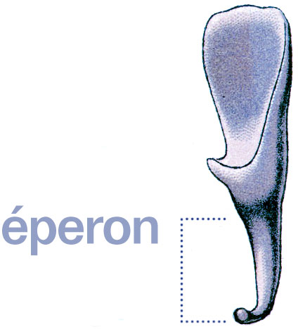 Détail d’un pétale d’Aquilegia alpina L. illustrant un « éperon », tiré d’une planche dans Flora von Deutschland, Österreich und der Schweiz, Prof. Dr. Otto Wilhelm Thomé, 1885, Gera, Allemagne.